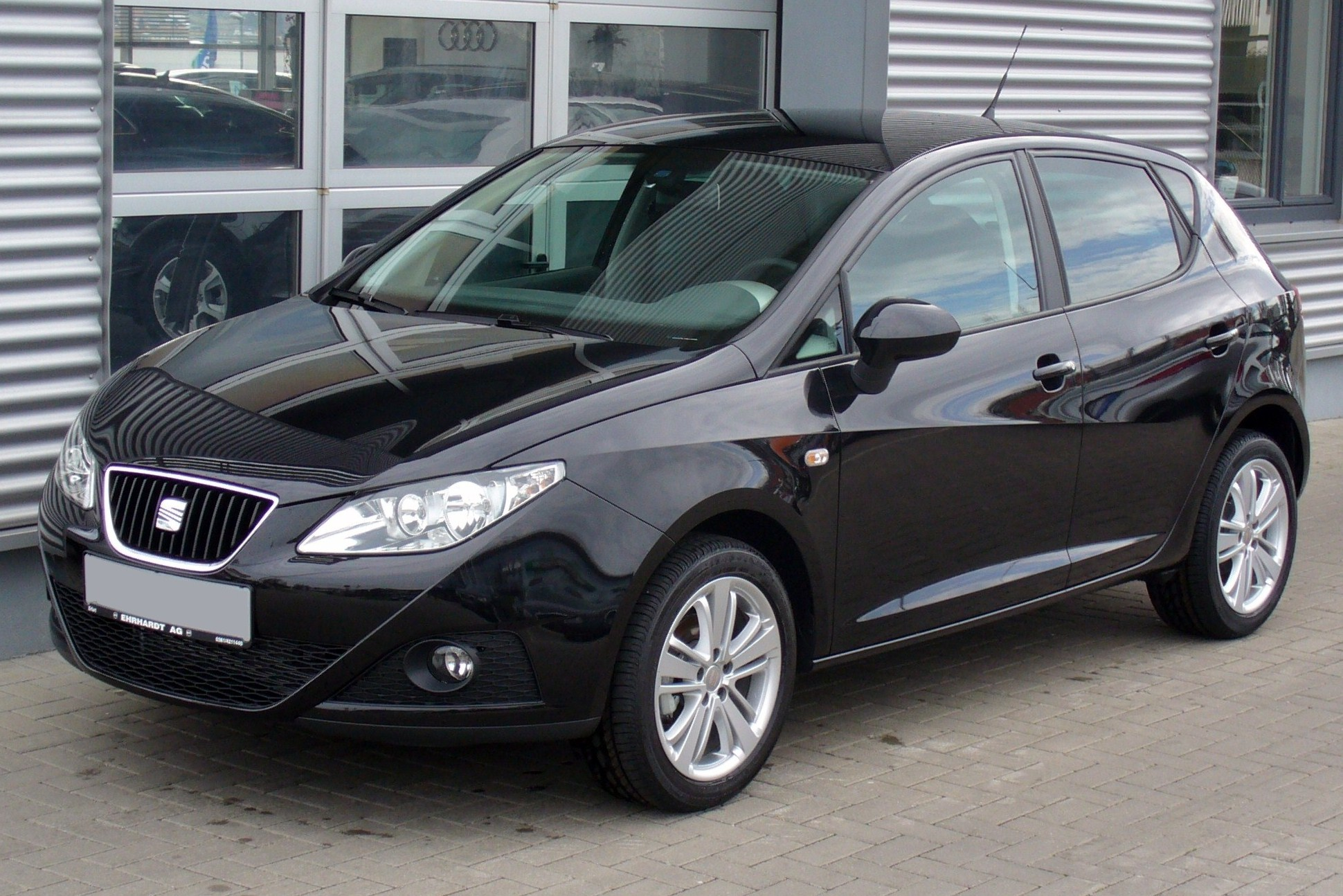 Seat Ibiza